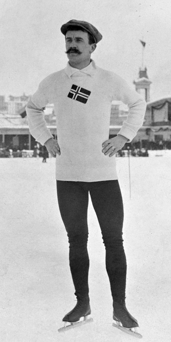 Sigurd Mathisen